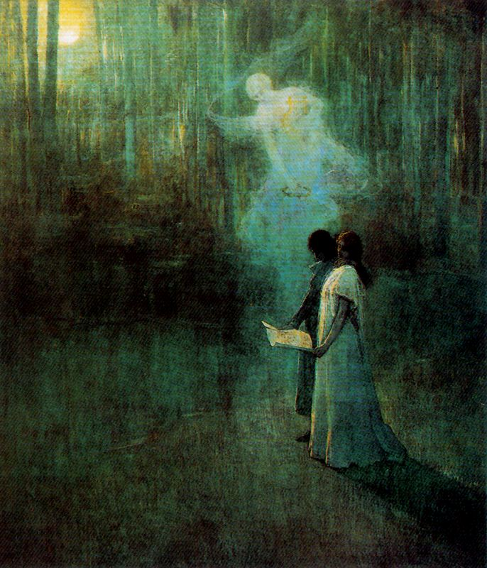 Canto de amor. 1905. Julio Romero de Torres. Círculo de la Amistad, Córdoba (España).